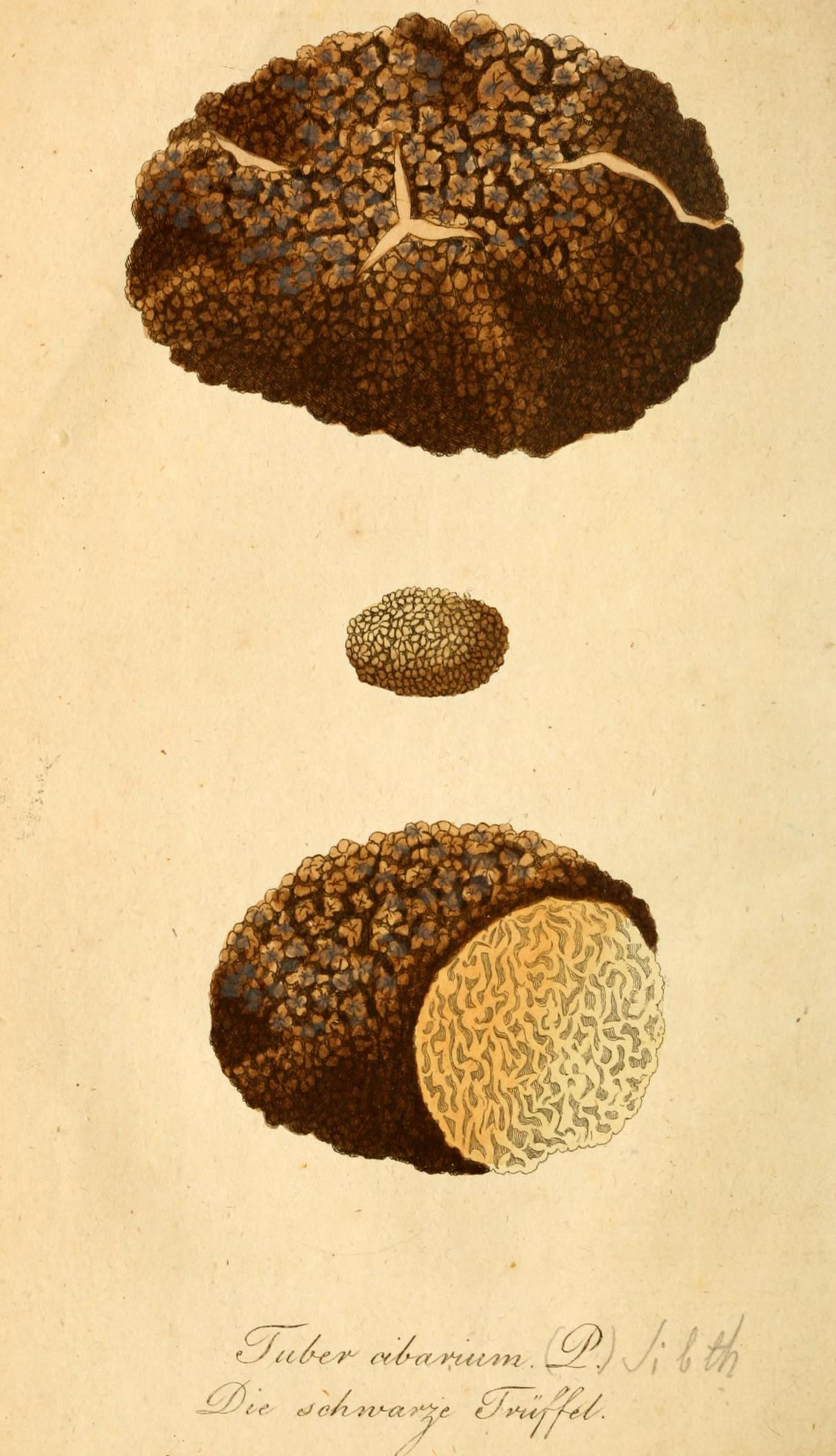 szarvasgomba (Tuber cibarium v. melanosporum)